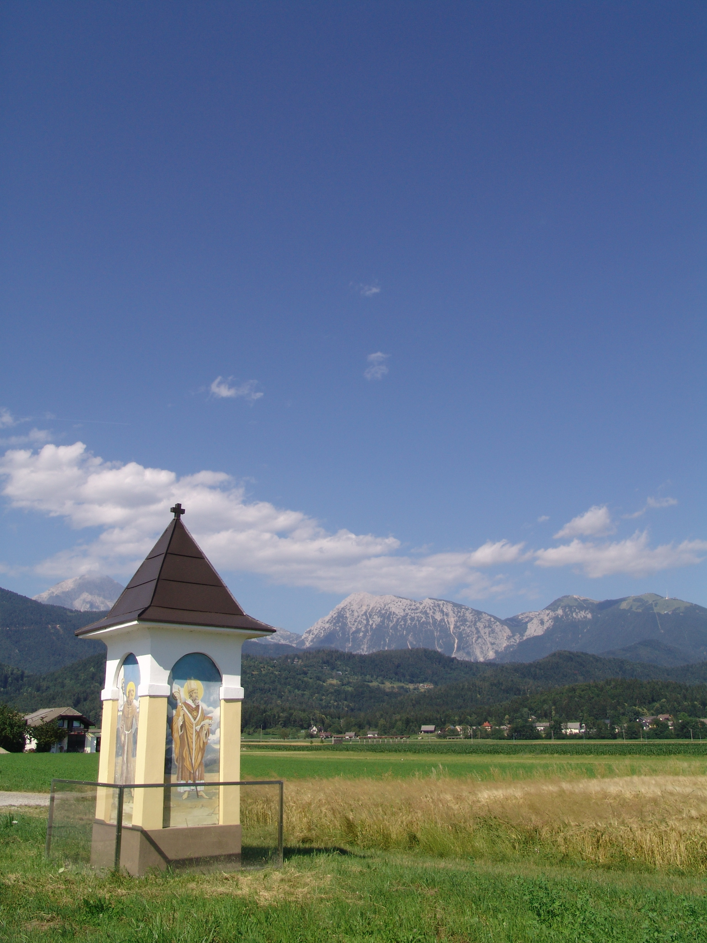 Kapelica svete Marije z Jezusom